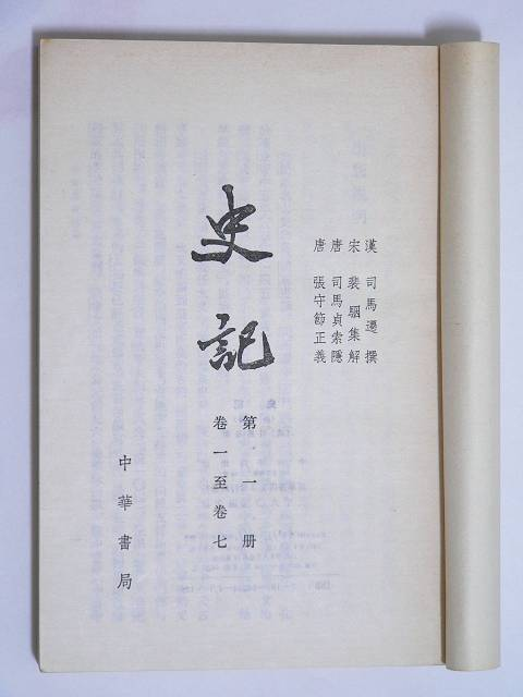 中华书局1982年版史记扉页 huowax摄